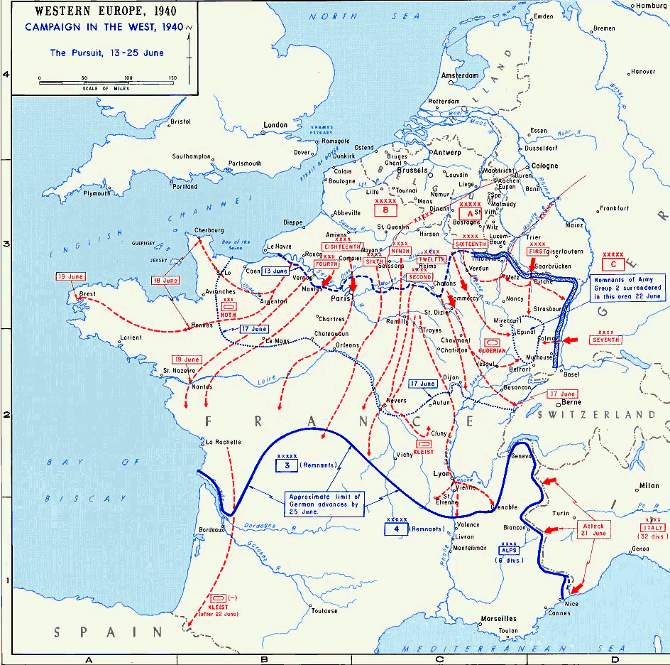 来源: Department of History